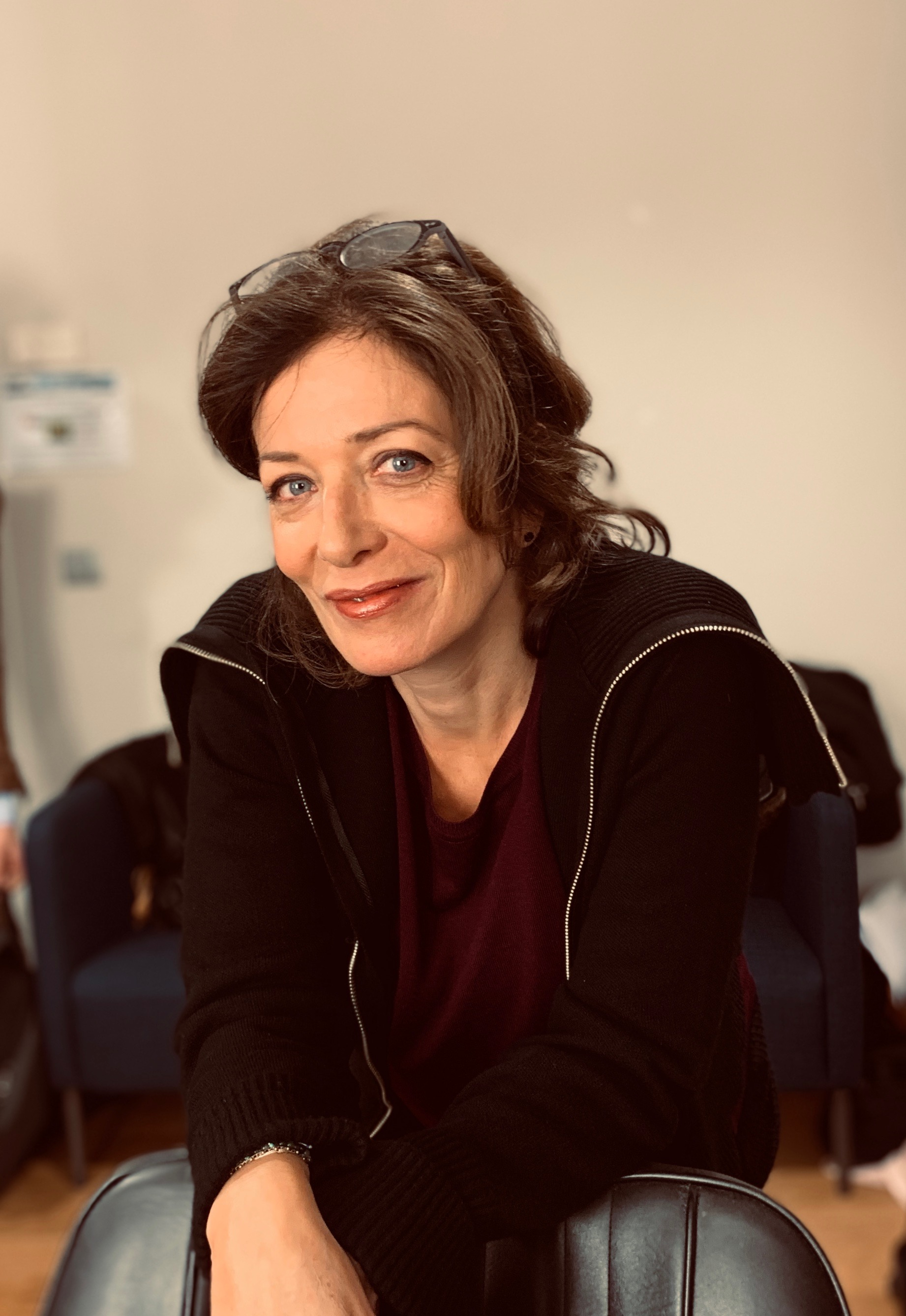 Virginie Darmon, actrice et maquilleuse de cinéma française, fille aînée de Gérard Darmon.